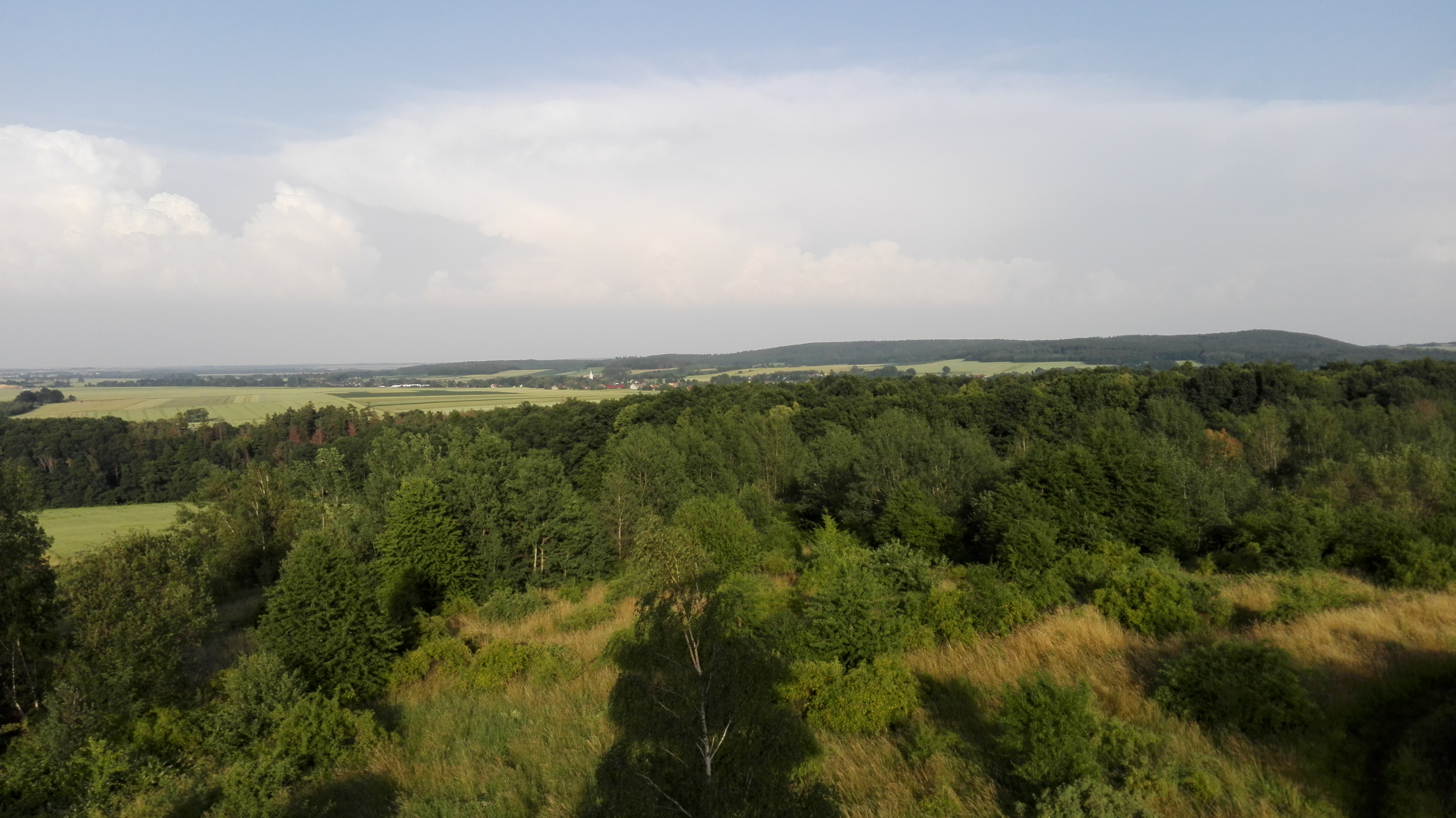 Prudnik, Klasztorne Wzgórze (Kozia Góra), bezleśny fragment grzbietu Okopowej - widok z wieży widokowej na panoramę Trzebiny